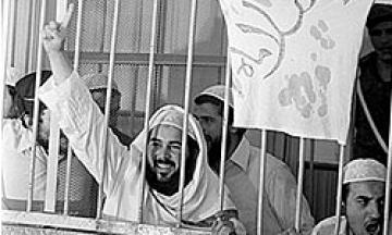 خالد الإسلامبولى أثناء محاكمته بتهمة قتل محمد أنور السادات